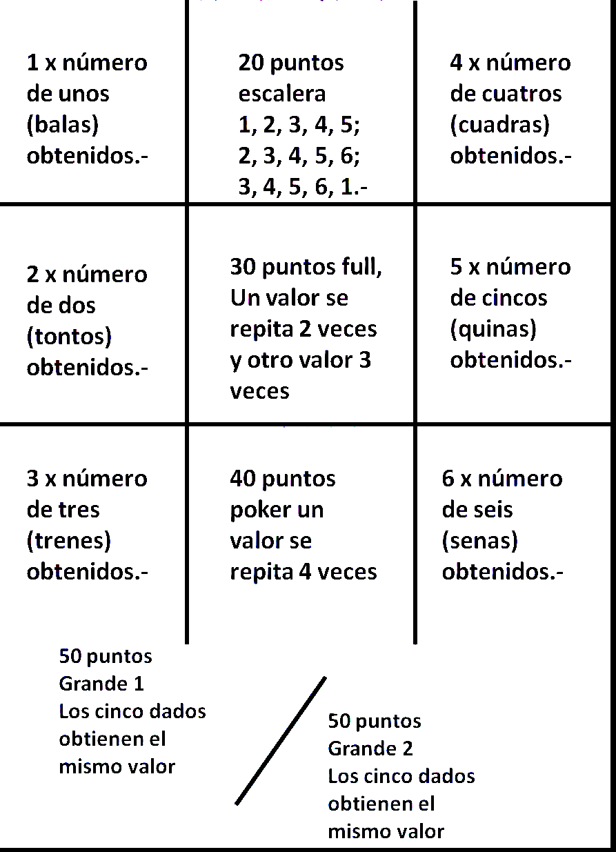 Tablero de Jugada de Huevo